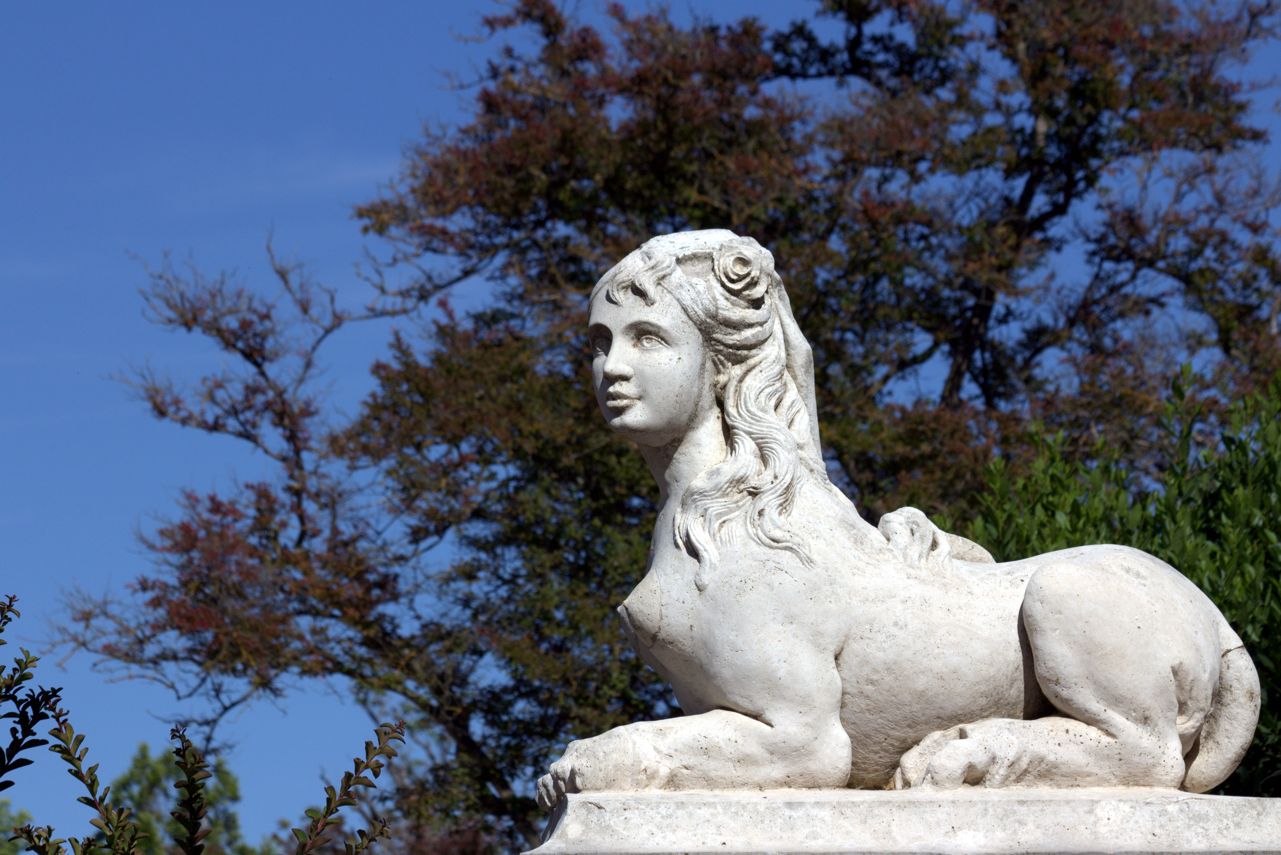 en los jardines